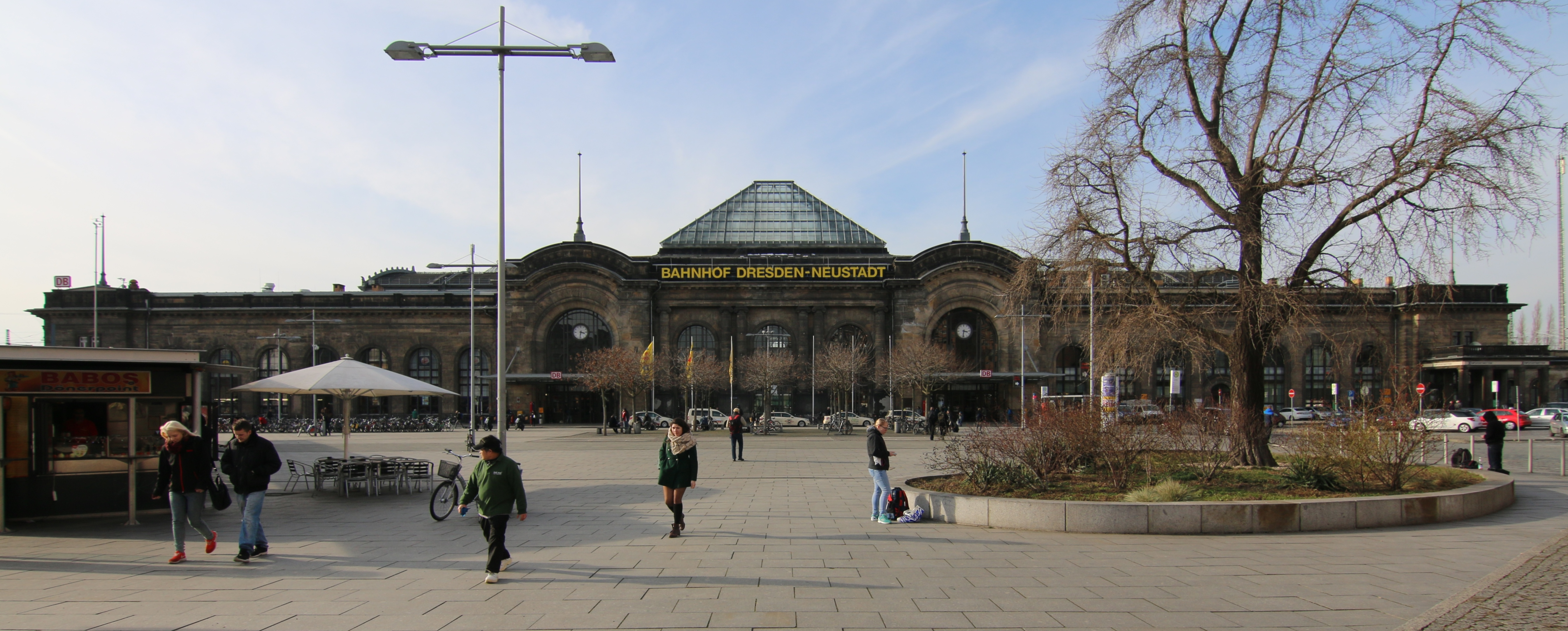 Bahnhof Dresden-Neustadt